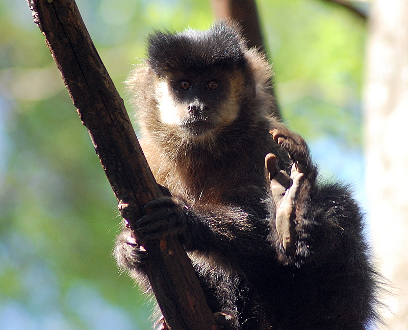 Reserva ambiental, Horto Florestal na cidade de Piraju-SP